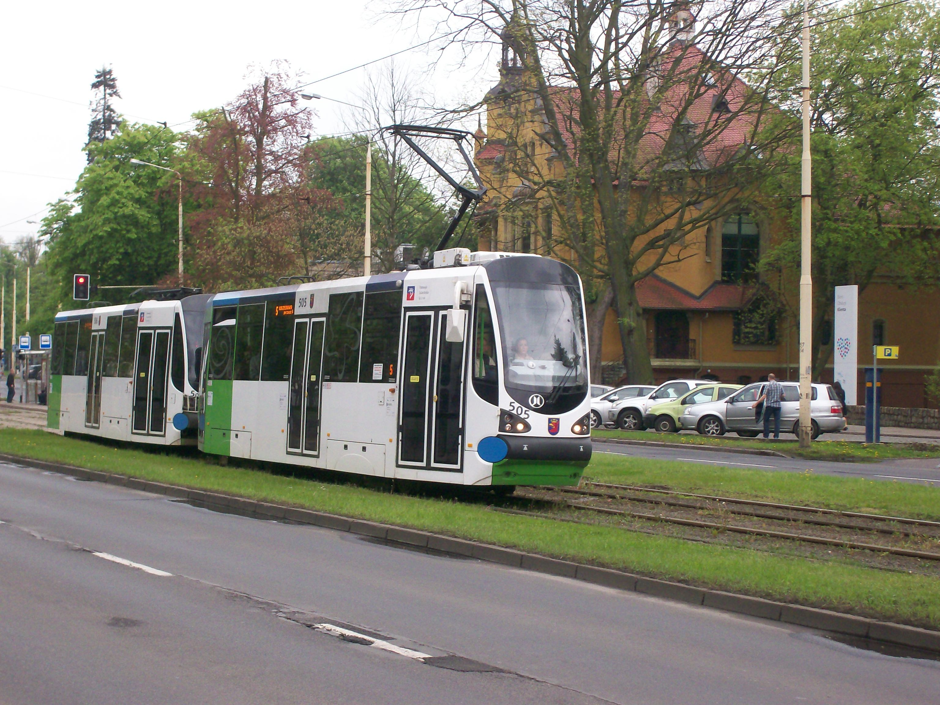 Moderus Alfa w Szczecinie